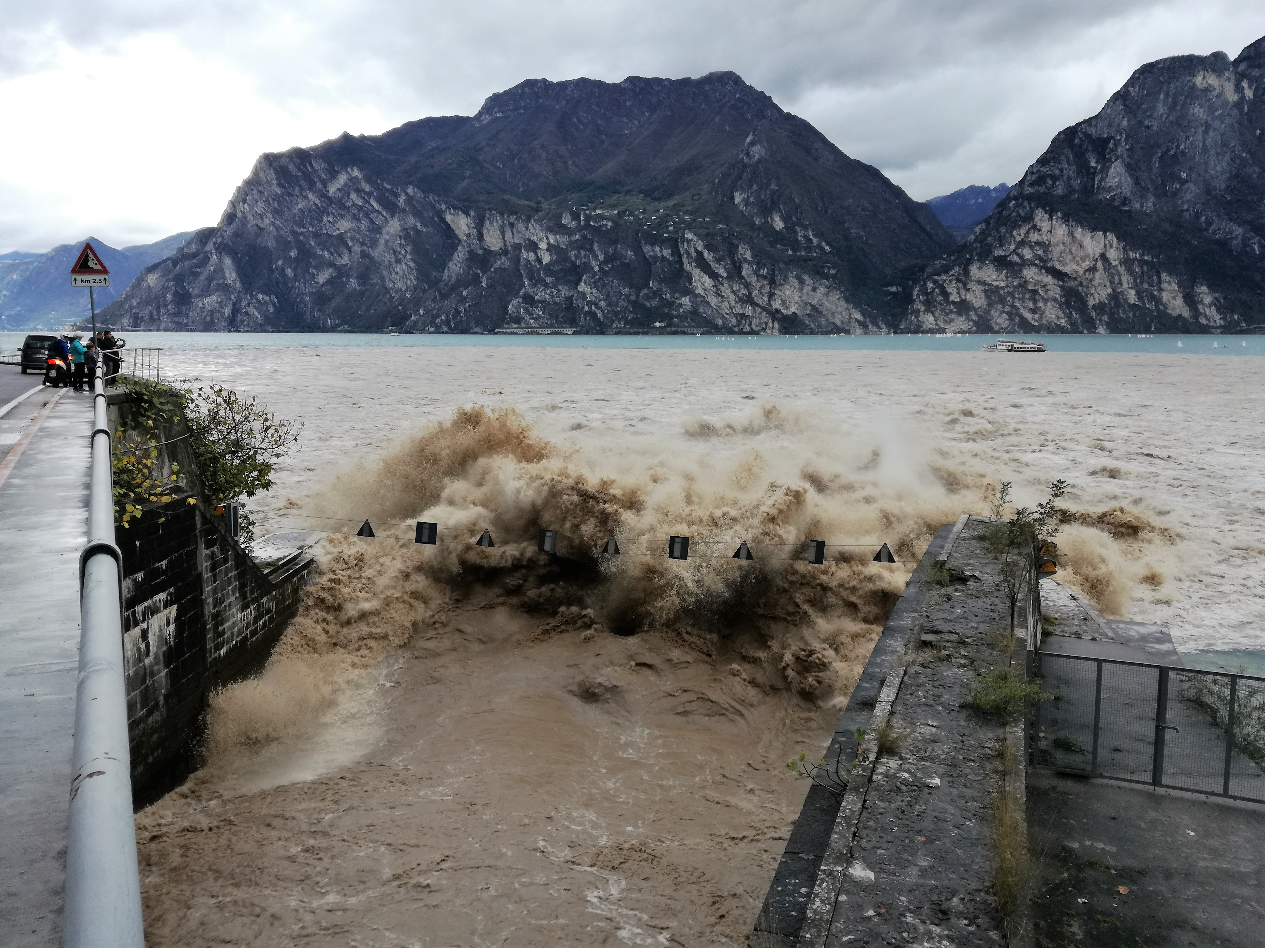 Etsch - Gardaseetunnel Hochwasser vom 30. Oktober 2018